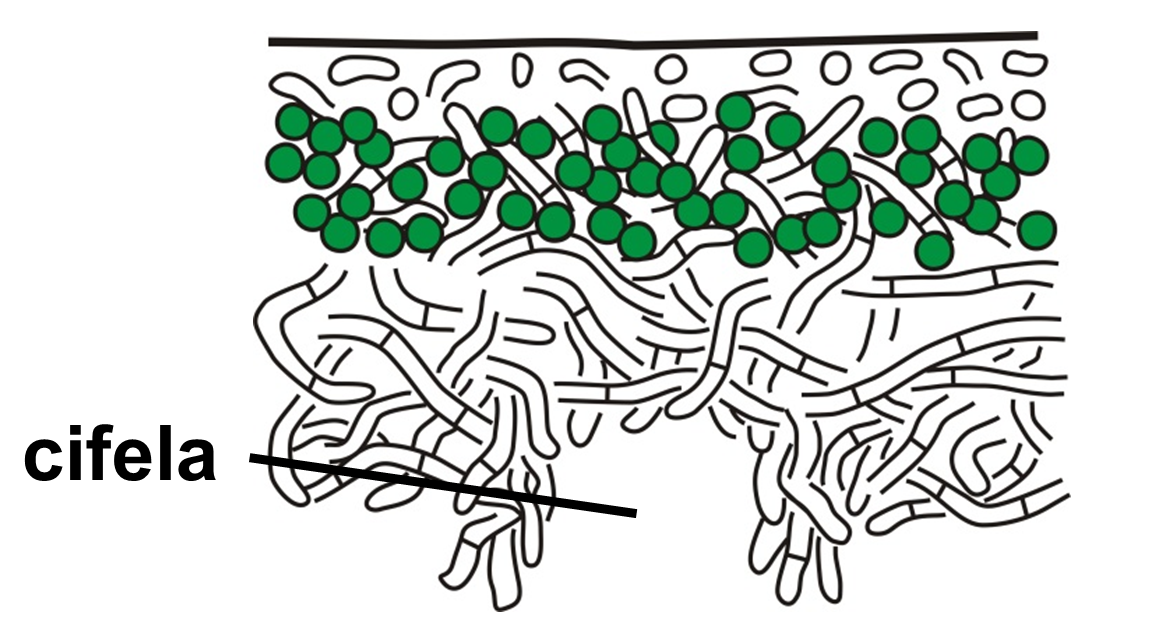 Cifela